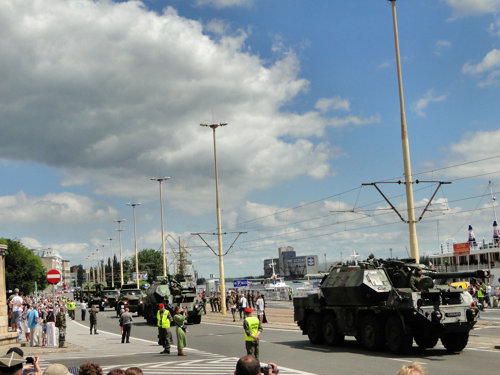 Defilada 12 Brygady Zmechanizowanej na Wałach Chrobrego w Szczecinie